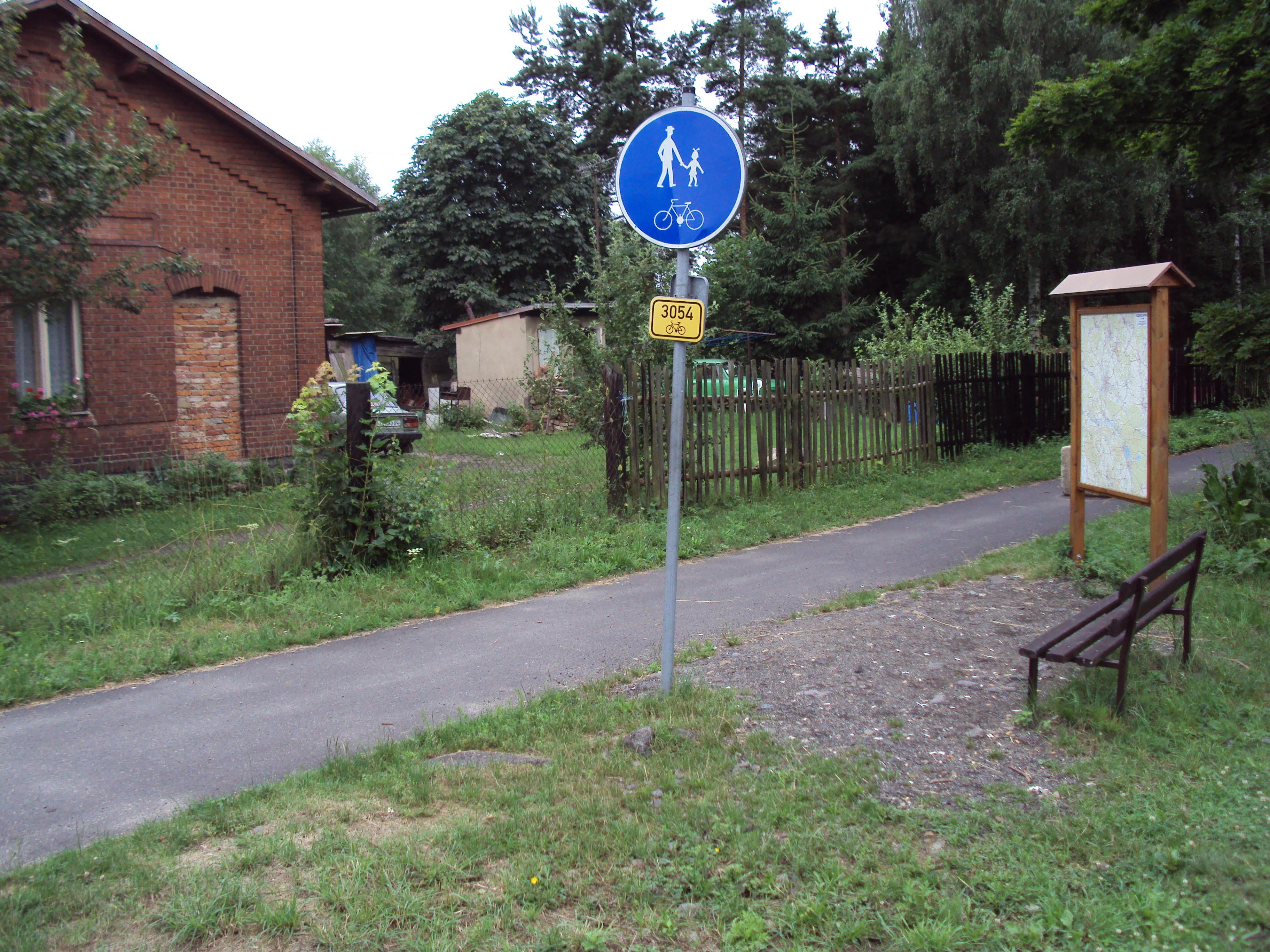 Cyklostezka 3054 vedle železniční stanice Vlčí Důl, okraj České Lípy